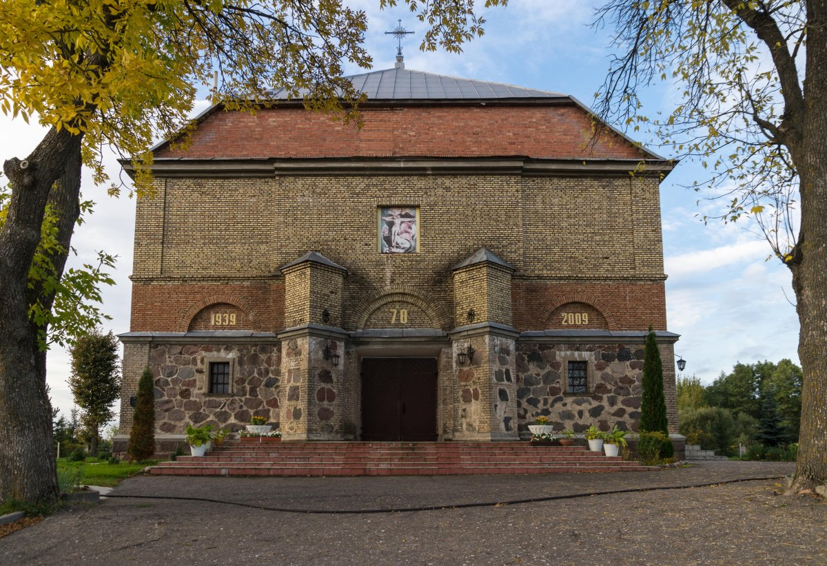 Войстам. Касцёл Найсвяцейшай Тройцы